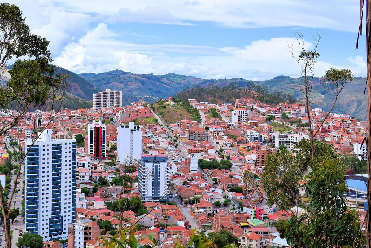 Vista panoramica de la ciudad de Sucre